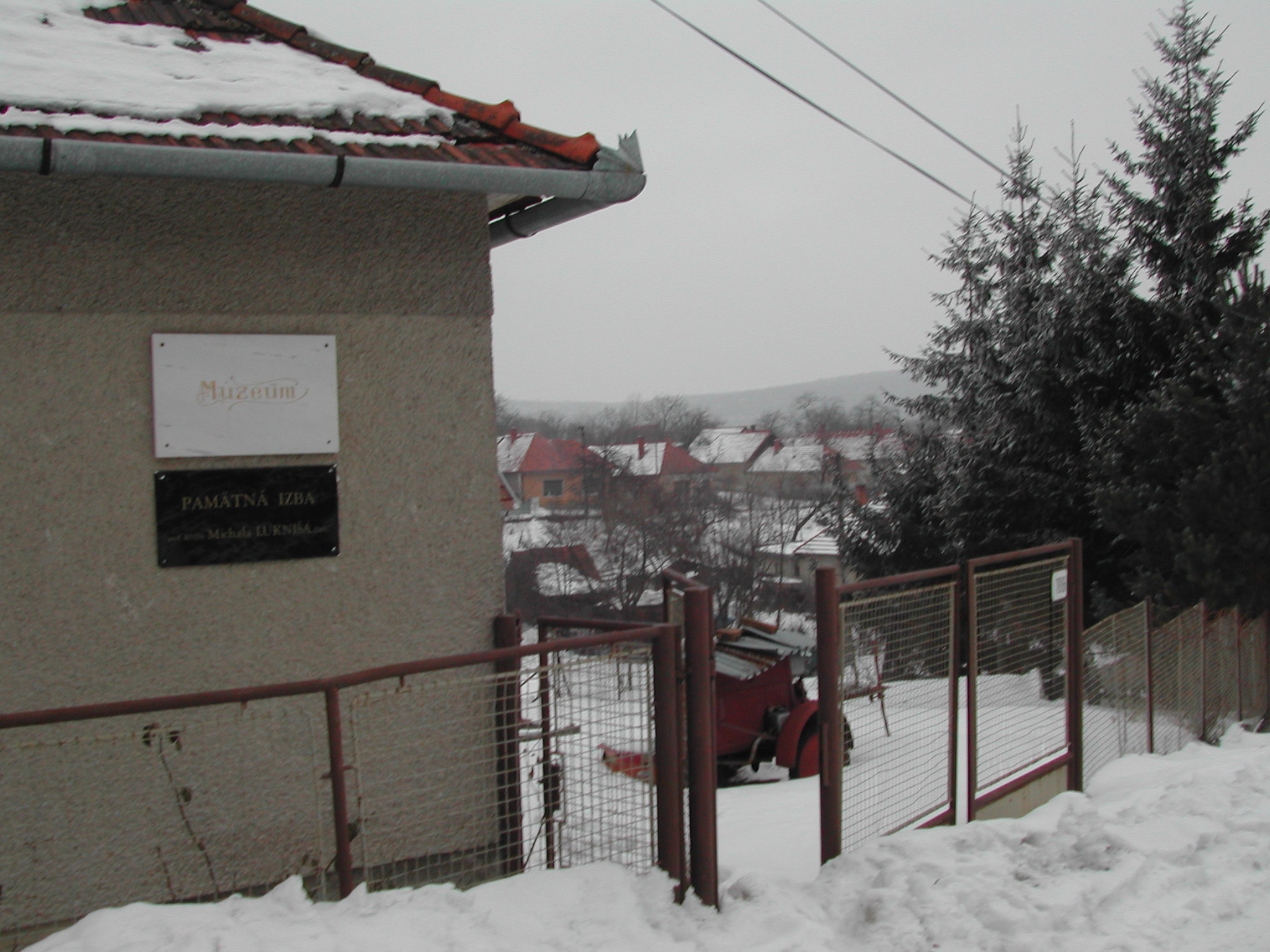 Múzeum v Zlatne (Zlaté Moravce)